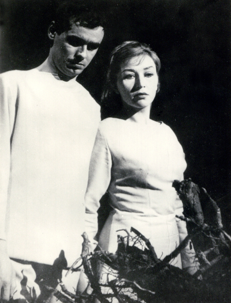 Dane Zajc, Otroka reke, Oder 57. Na fotografiji: Danilo Benedičič (Dan), Iva Zupančič (Reka).